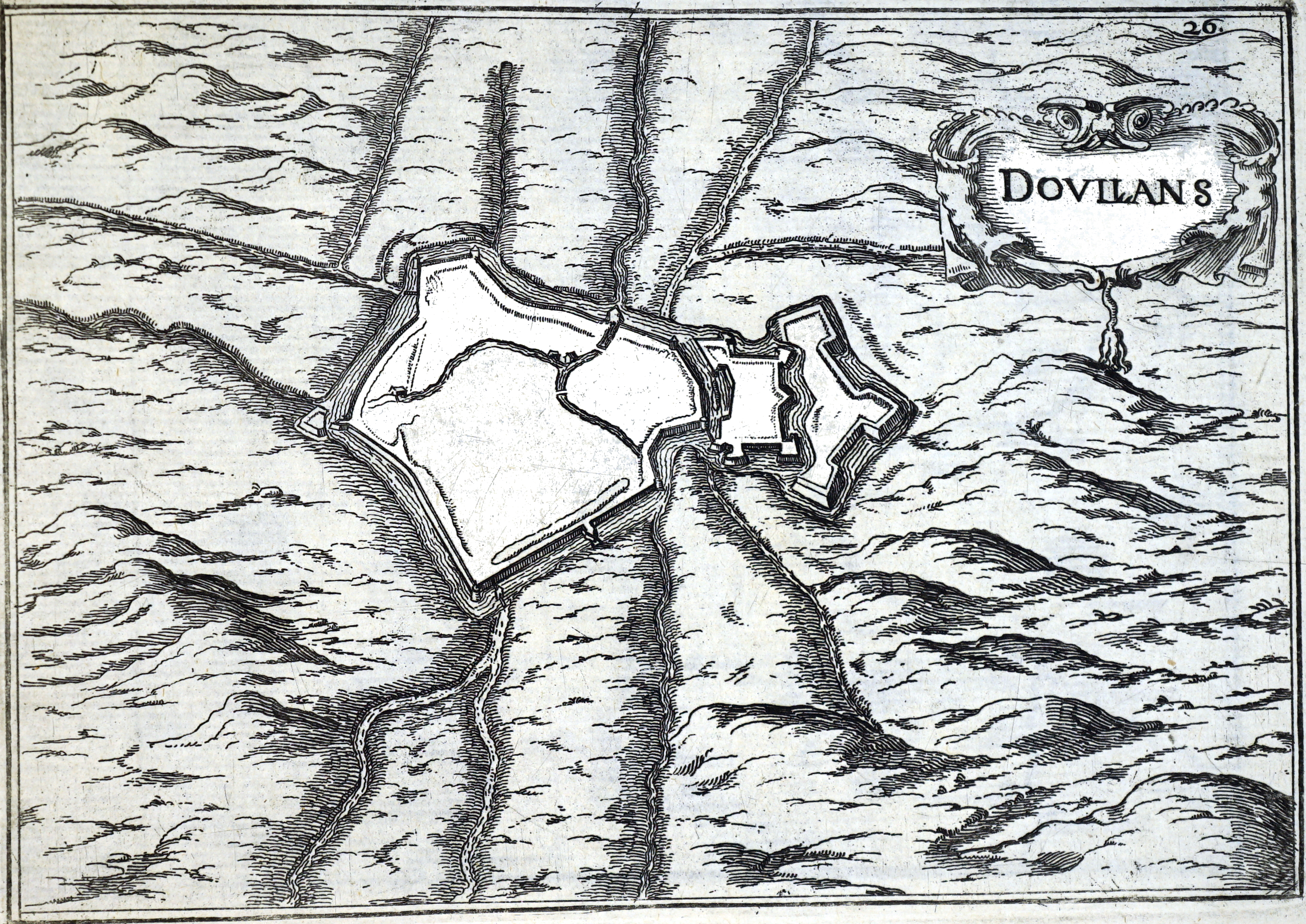 par un dessin de Tassin.